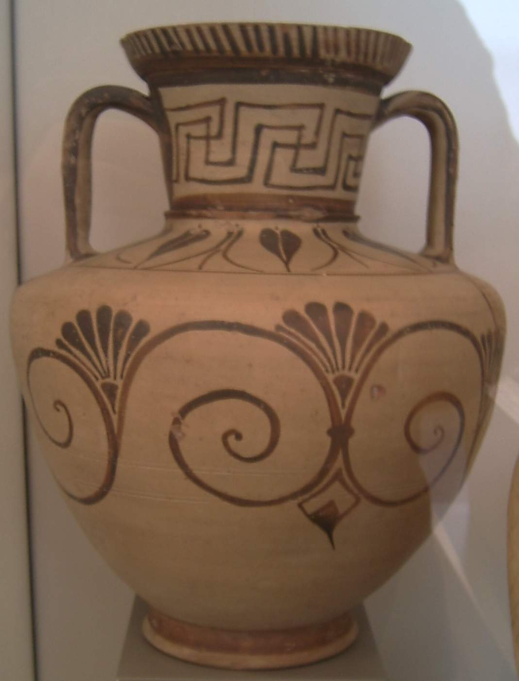 Ostgriechischer Amphora des Fikellura-Stils; Antikensammlung Berlin/Altes Museum